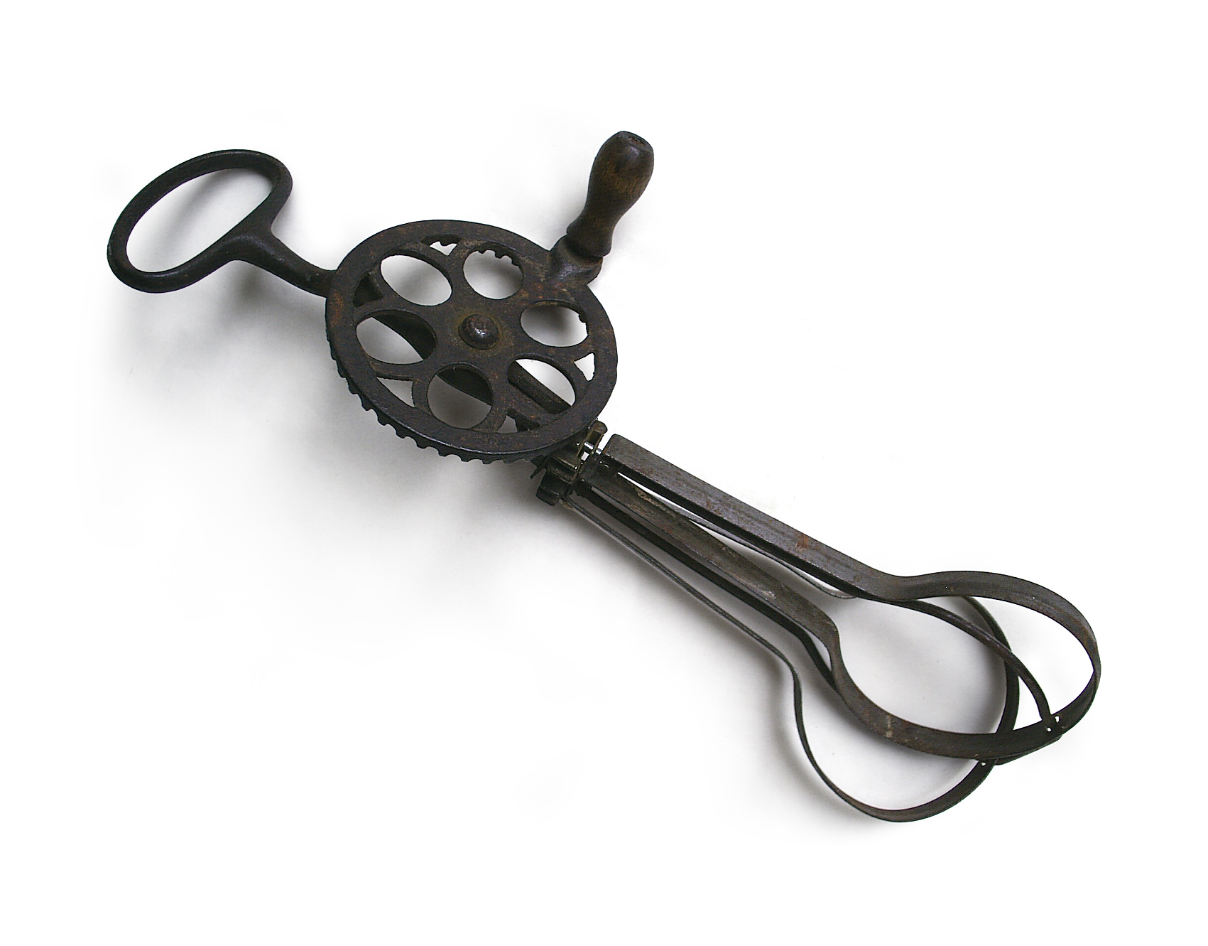 Vintage mixer